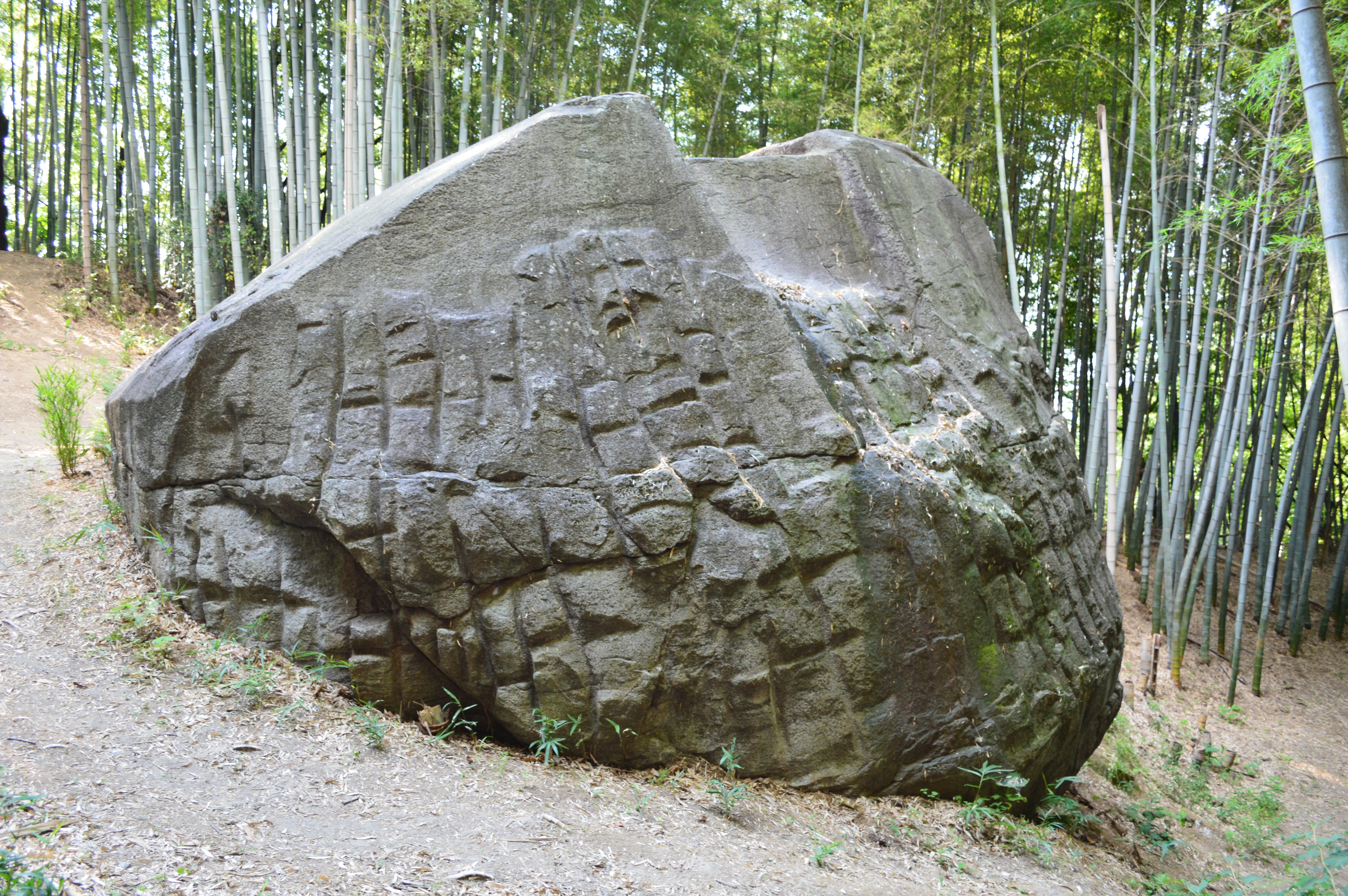 益田の岩船 東面